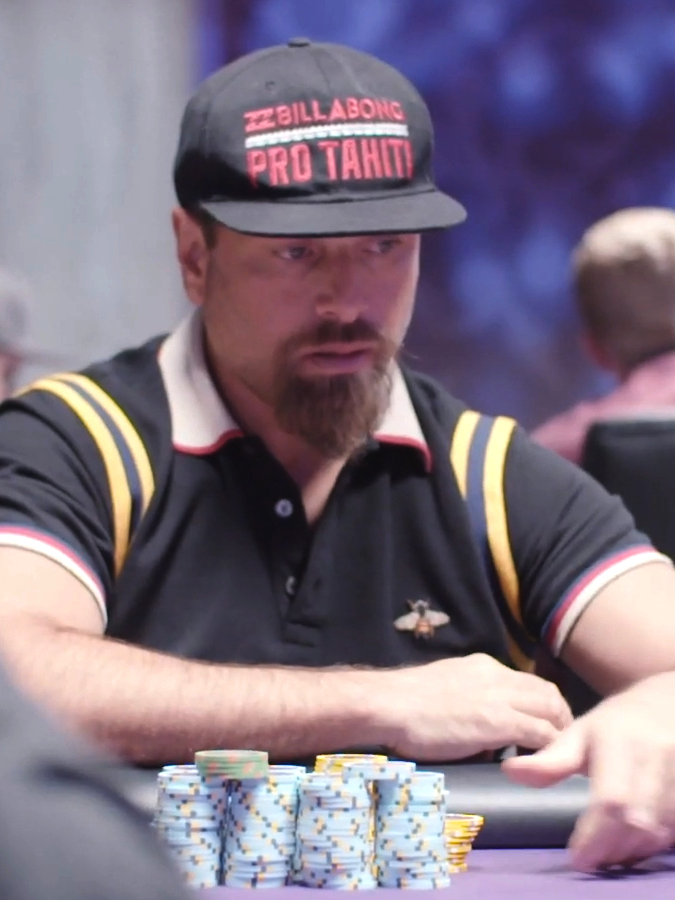 Rick Salomon beim Super High Roller Bowl V